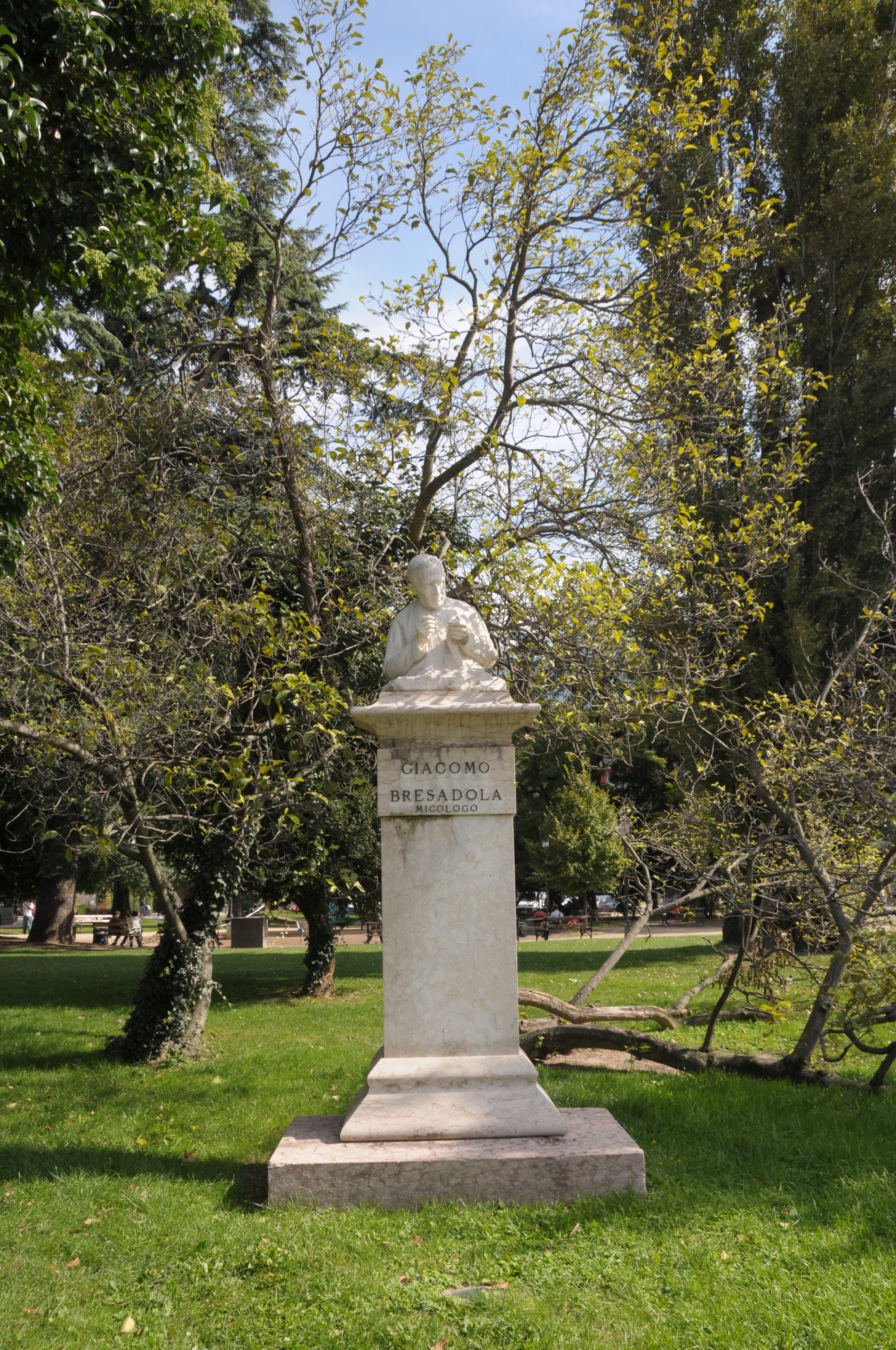 Busto di Giacomo Bresadola This is a photo of a monument which is part of cultural heritage of Italy.